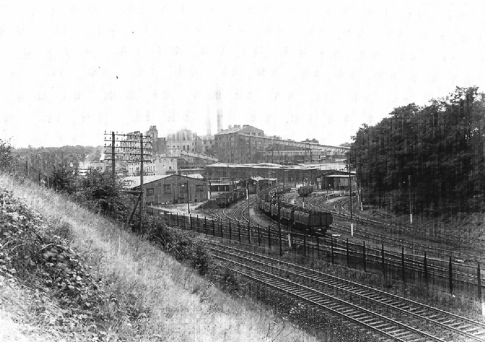 Brühl-Heide, Gruhlwerk I, Verladestation